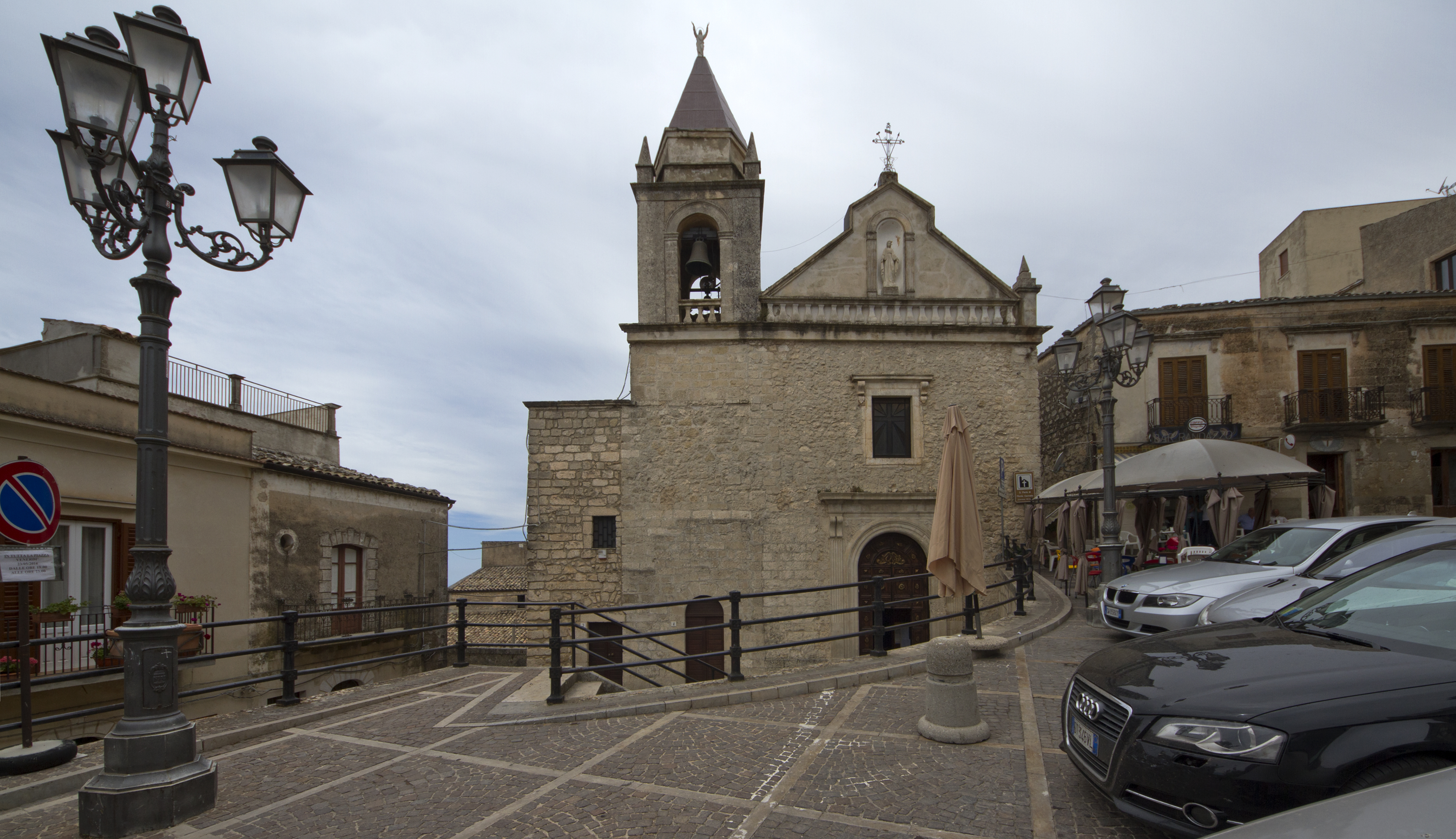 92010 Caltabellotta AG, Italy